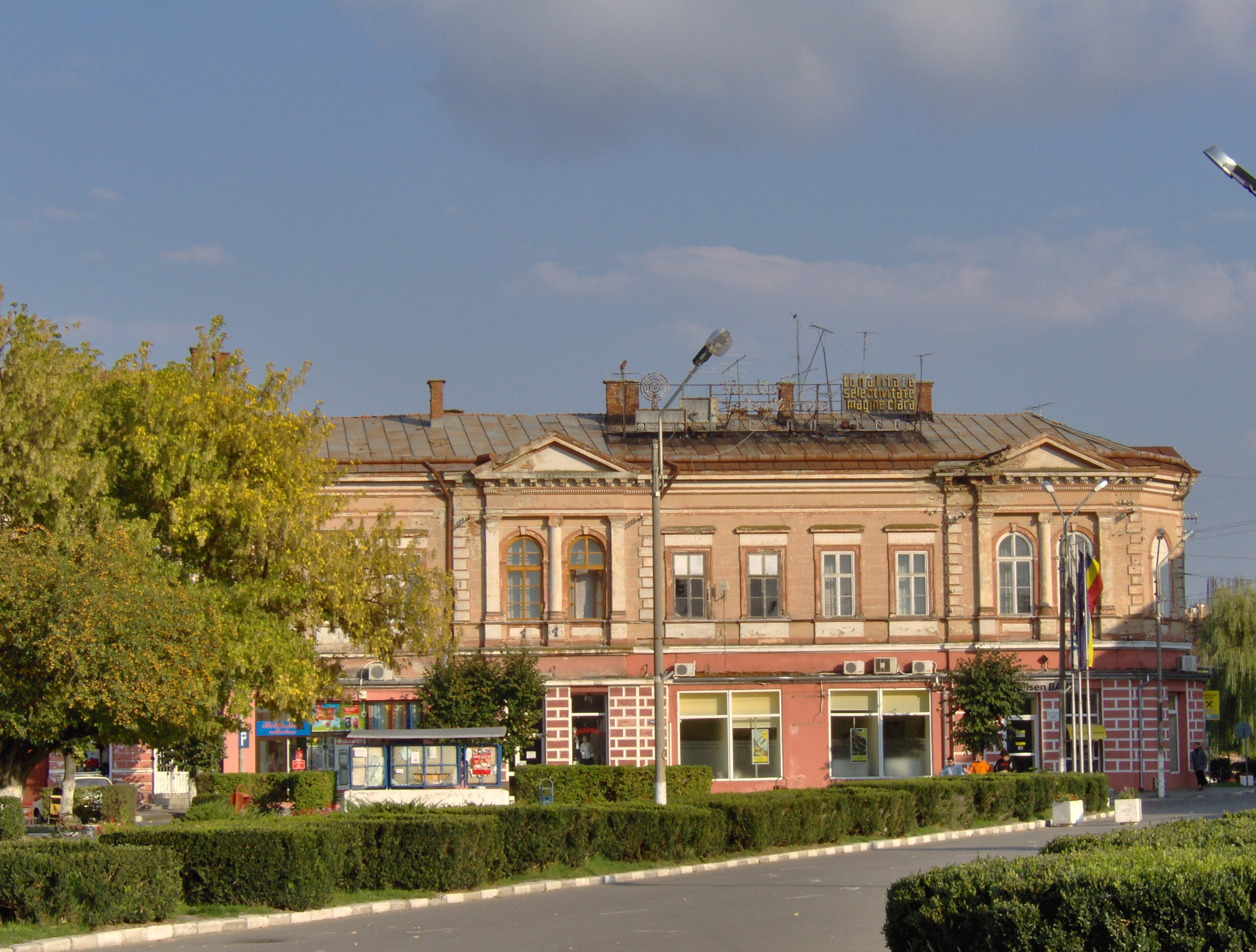 Centru vechi Fagaras